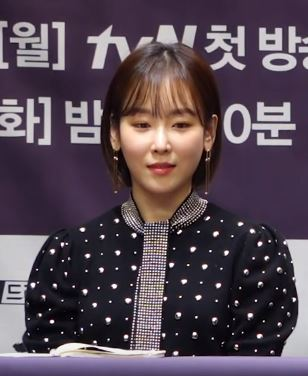 tvN 새 월화드라마 '블랙독' 제작발표회가 11일 오후 서울시 구로구 신도림 라마다호텔에서 열렸다.